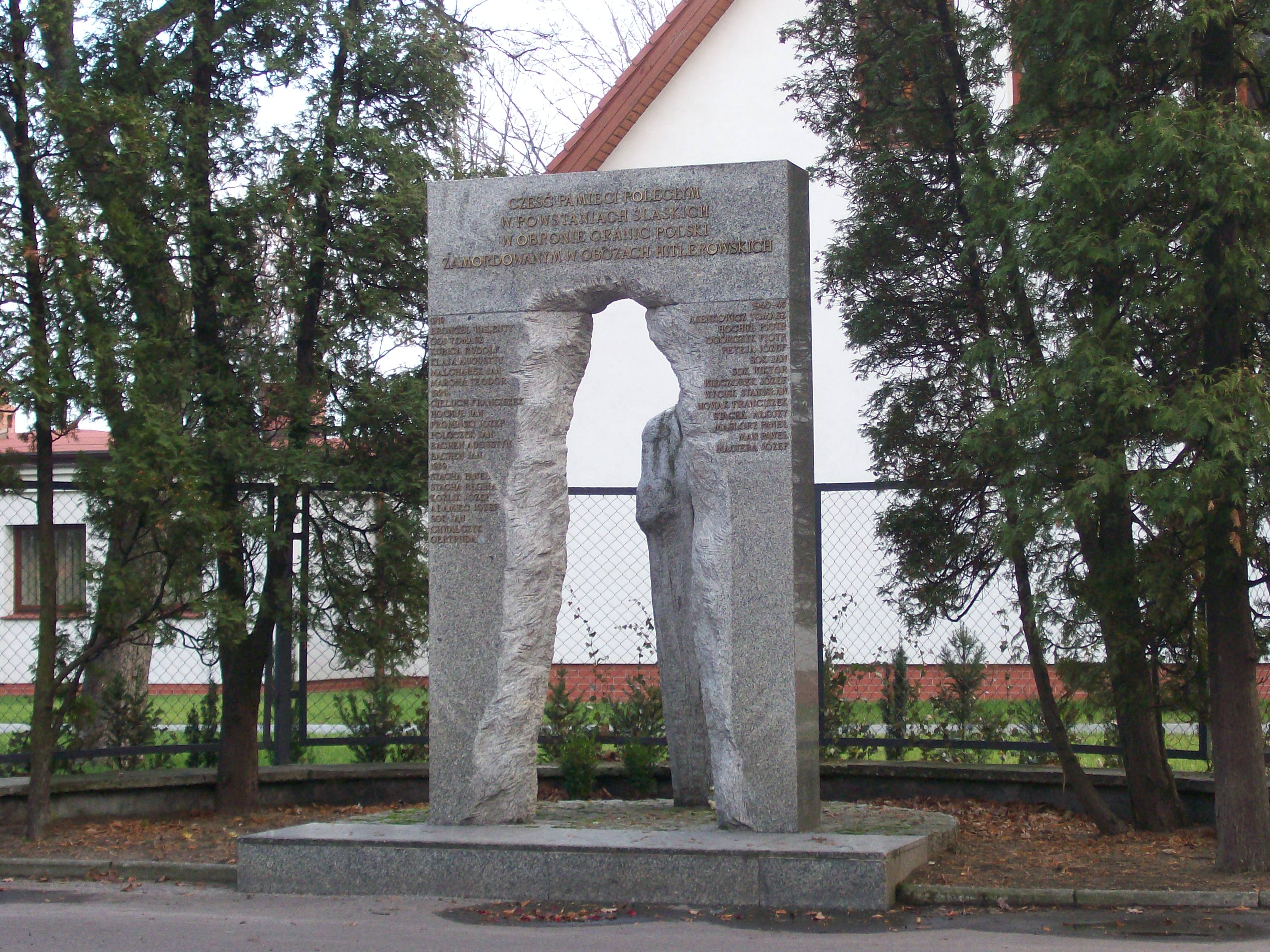 description:Pomnik ku czci poległych w Powstaniach Śląskich i zamordowanych w obozach hitlerowskich w okresie II wojny światowej - Giszowiec Plac Pod Lipami. author:Ewkaa